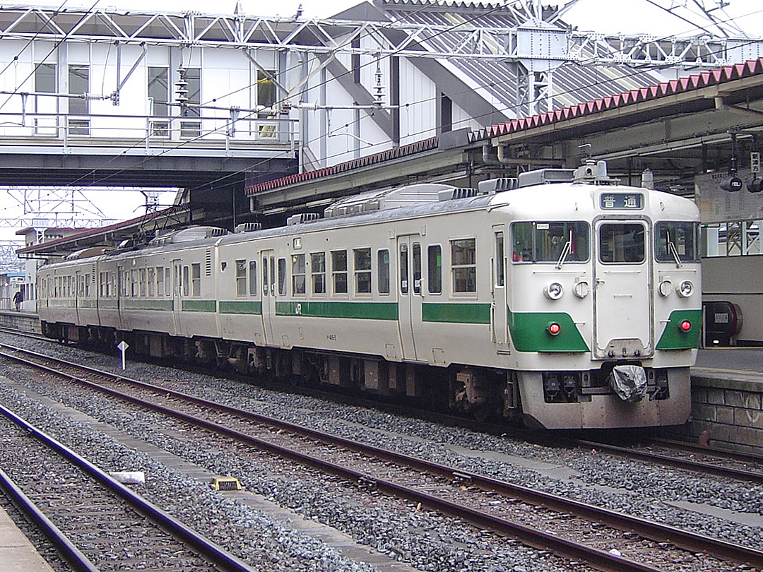 郡山駅に停車中の国鉄417系電車